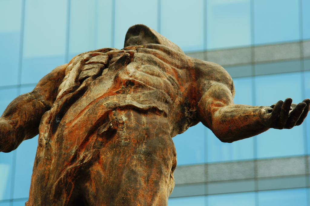 Detalle de la escultura realizada por el maestro poblano Jesús Corro Ferrer en el año de 1989, por encargo de la CANACO. Localizada en la esquina que forman las calles de Arcos de Belén y Balderas, en el centro de la Ciudad de México.